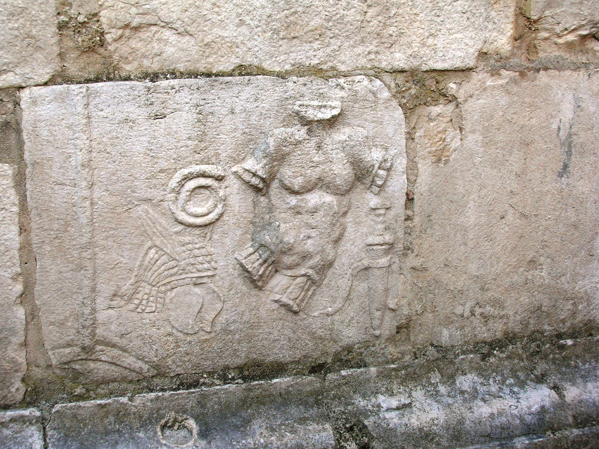 L'abbazia del Goleto a Sant'Angelo dei Lombardi